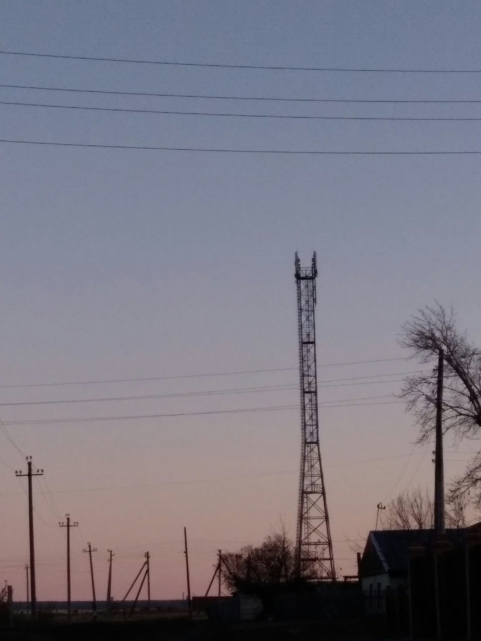 Берлин поселок